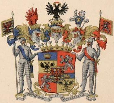 Orlovi suguvõsa krahvivapp